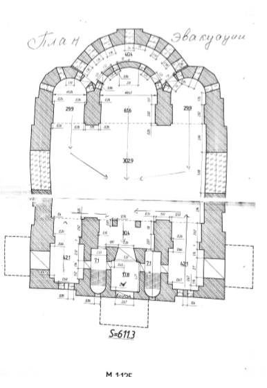 Фотография плана эвакуации из храма